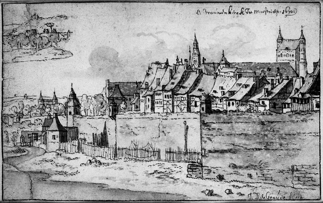 Onze Lieve Vrouwekerk: en Onze Lieve Vrouwe Wal, tekening van J.de Grave, 1670